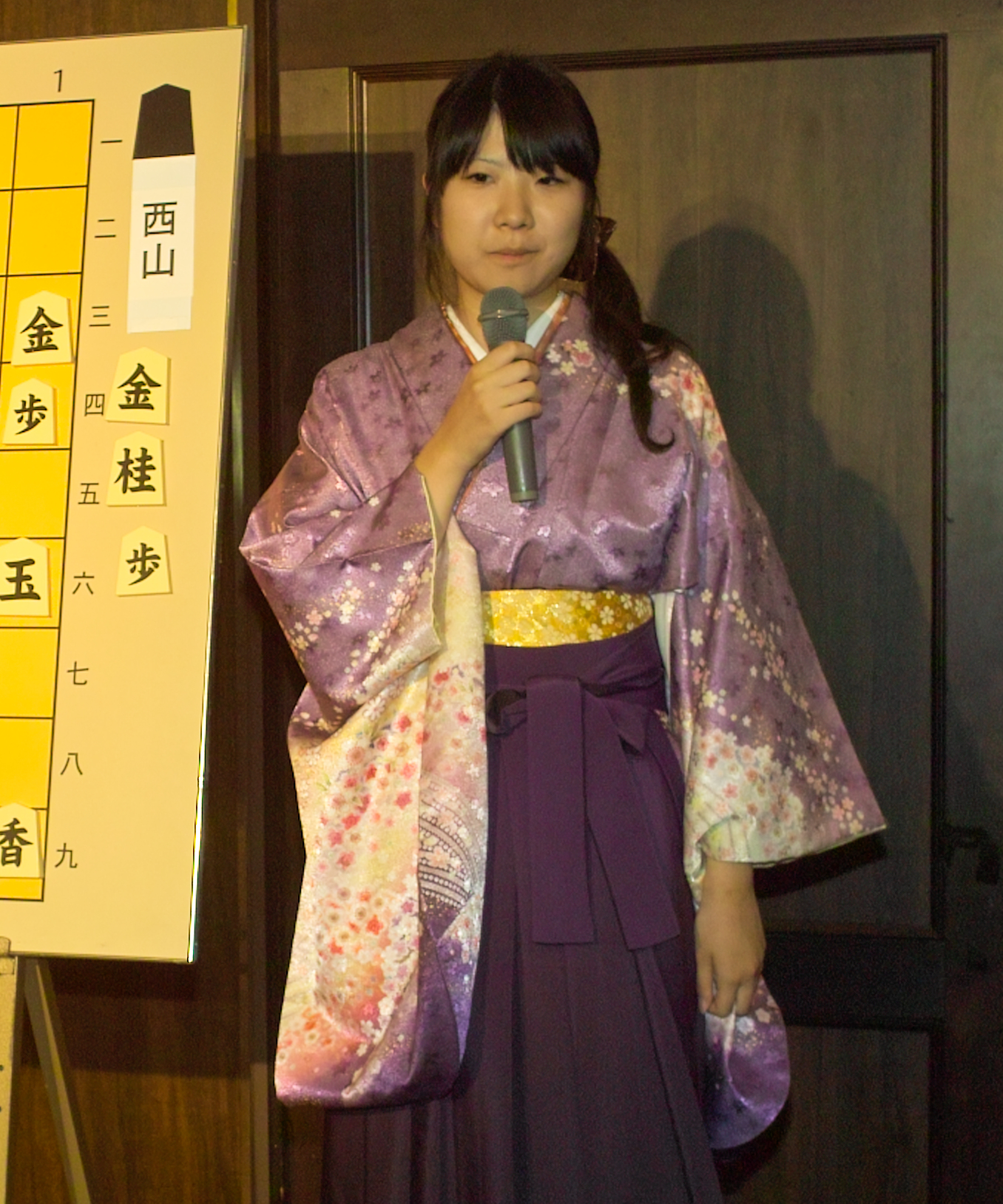 2014年10月29日 第4期リコー杯女流王座戦五番勝負第1局 対局終了後の西山